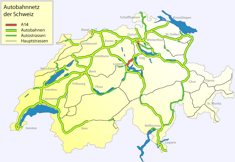 Verlauf der Autobahn A14 in der Schweiz